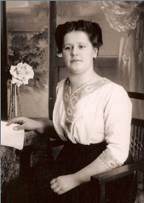 Anny Morf, spätere Anny Klawa-Morf (* 10. Januar 1894 in Basel; † 15. April 1993